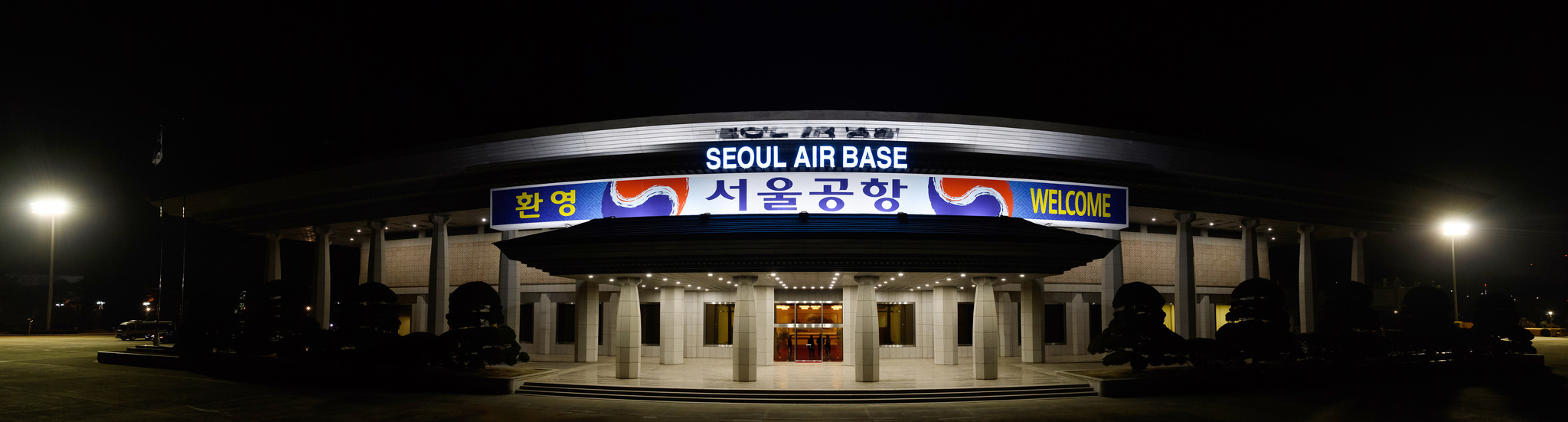 President Moon Jae-in arrives at Seoul Airport December 16, 2017 Seoul Airport, Seongnam-si, Gyeonggi-do